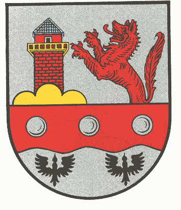 Wappen von Kreimbach-Kaulbach